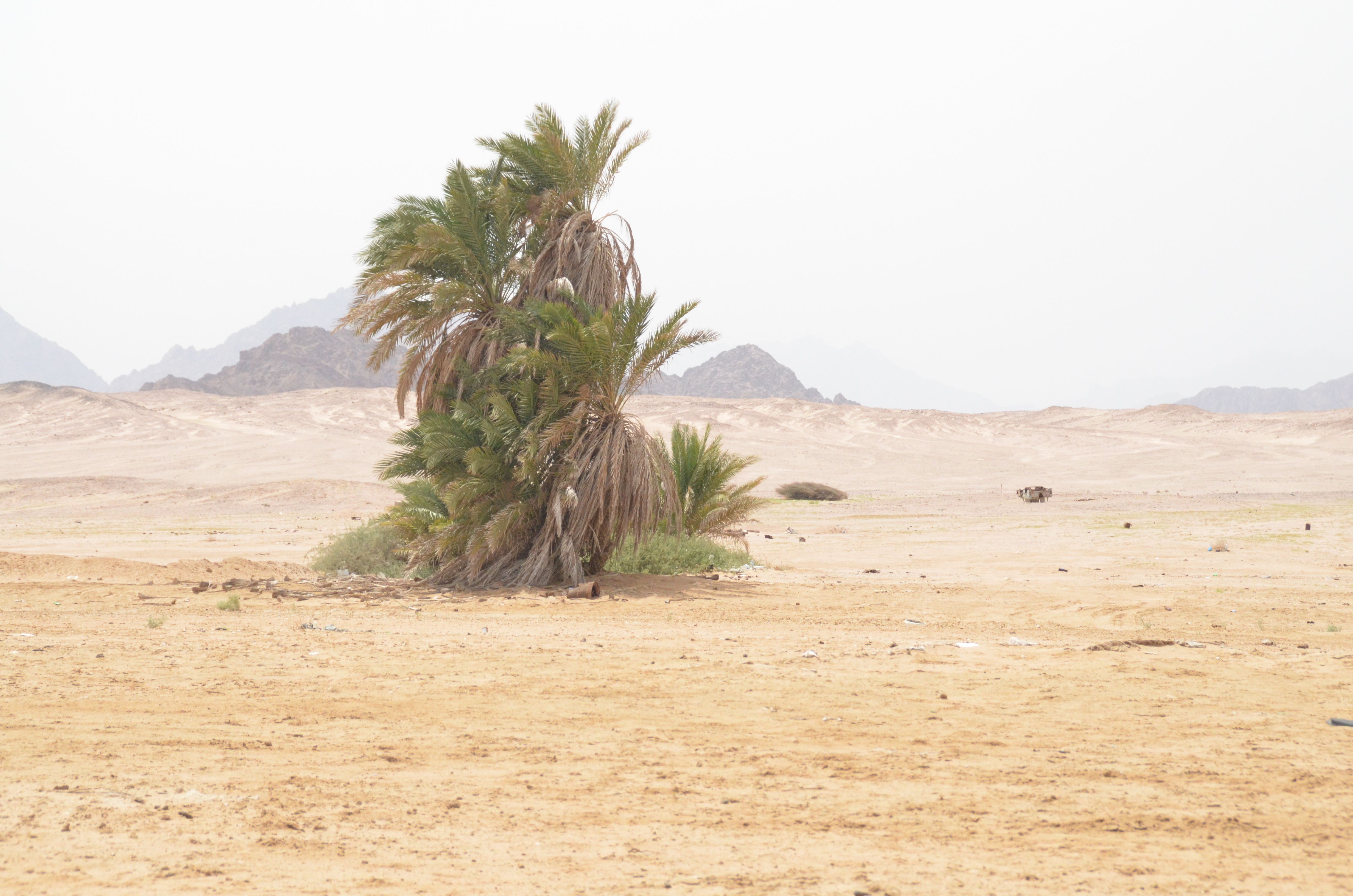 محمية نبق جنوب سيناء بالقرب من مدينة شرم الشيخ